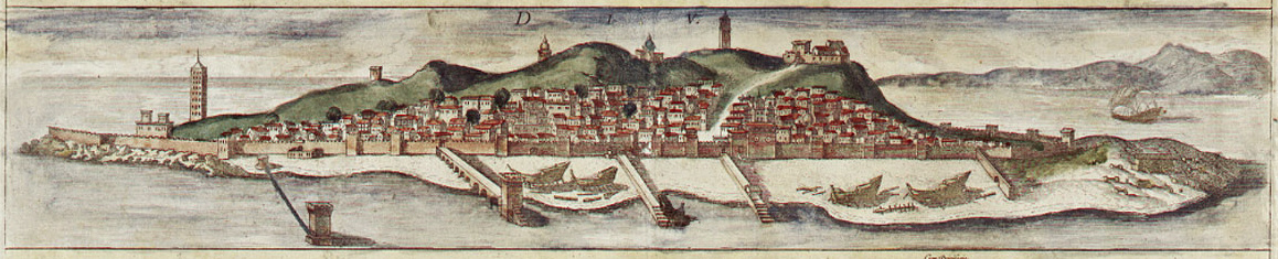 Diu